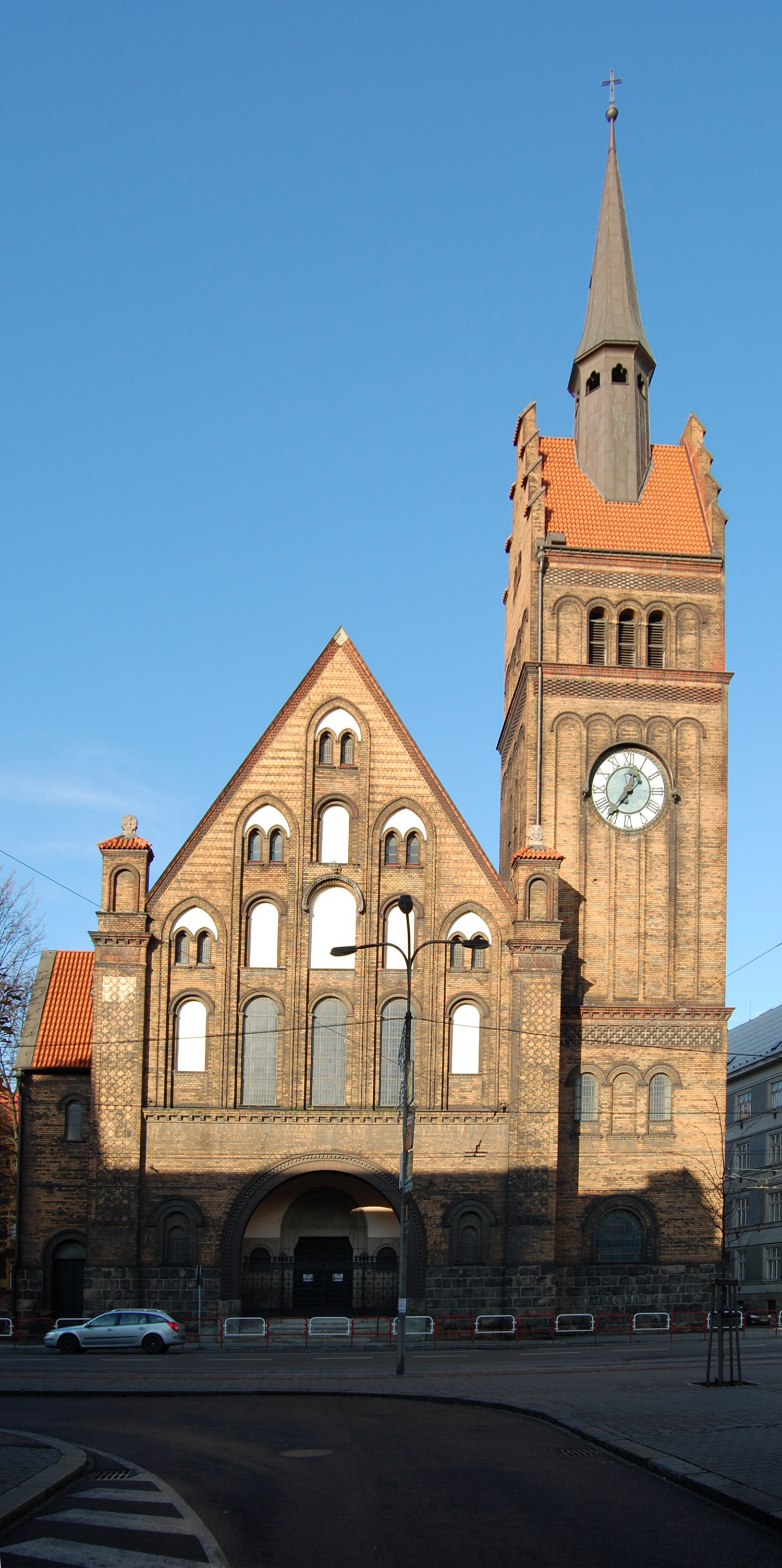 Evangelický Kristův kostel, Ostrava. Evangelical Christ's Church in Ostrava, Czech republic.